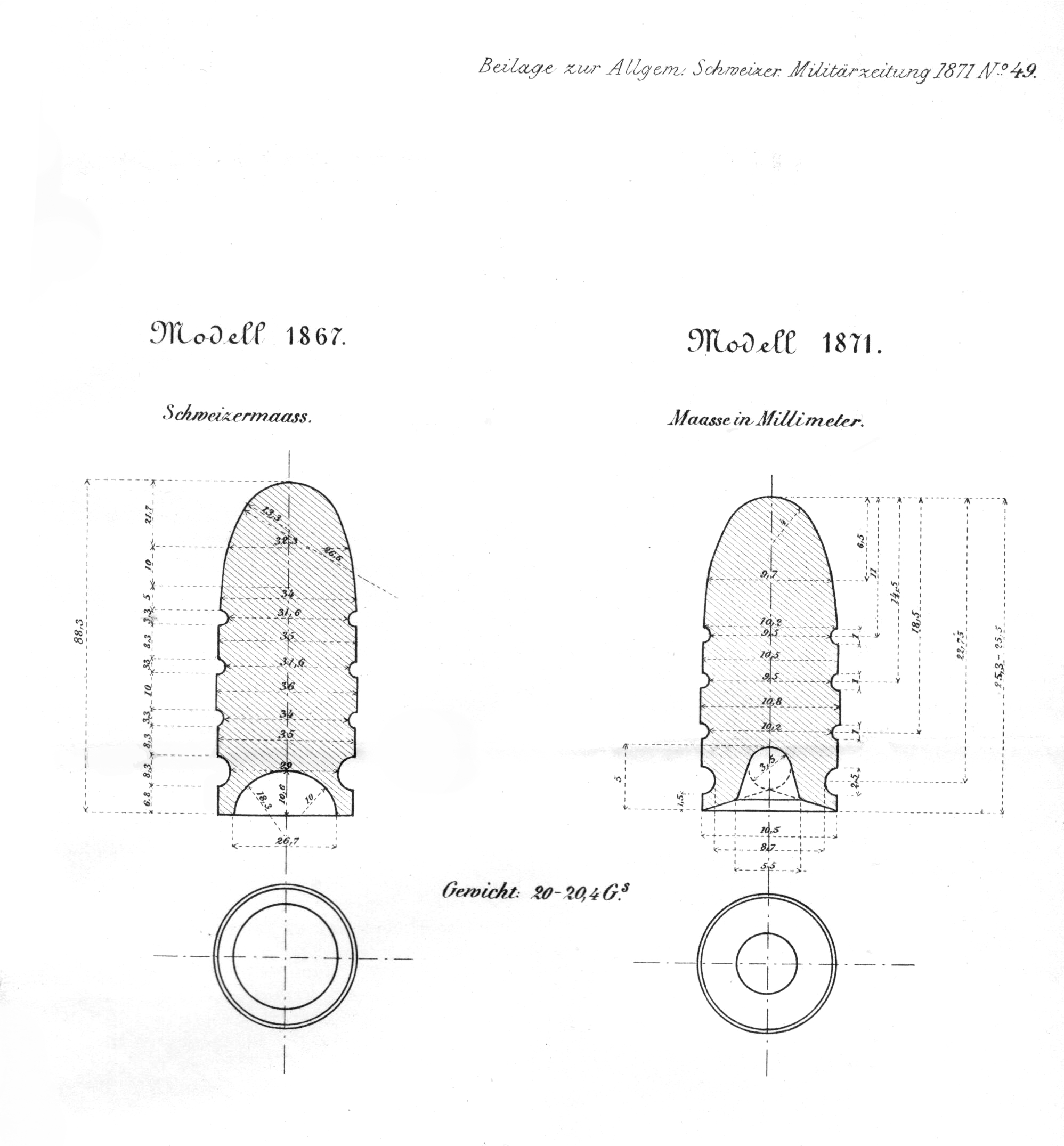 Plan de profil des balles pour les cartouches mod GP1867 et GP1871 Extrait de la revue Allegemeine Schwrizreische Militär-zeitung 1871